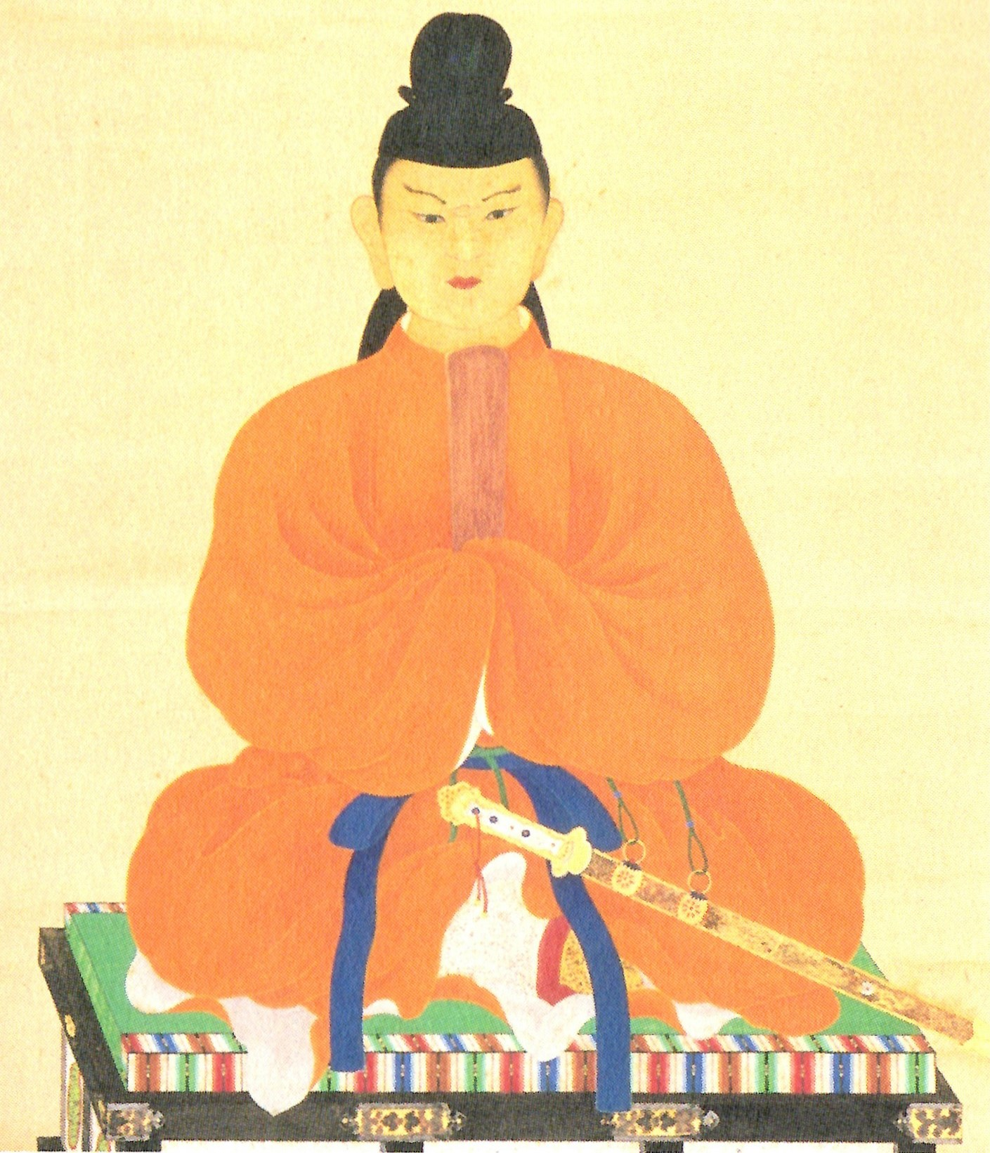 弘文天皇の御影。